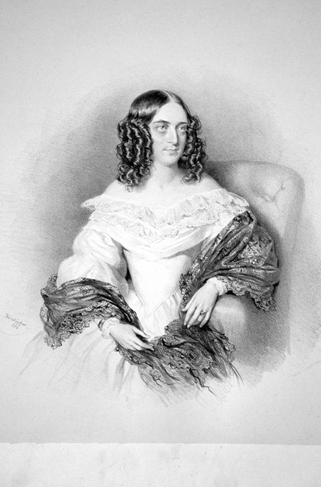 Marianne Gräfin Wimpffen, geb. Eskeles (1801-1862), Ehefrau von Franz Wimpffen, Salondame. Lithographie von Josef Kriehuber, 1856